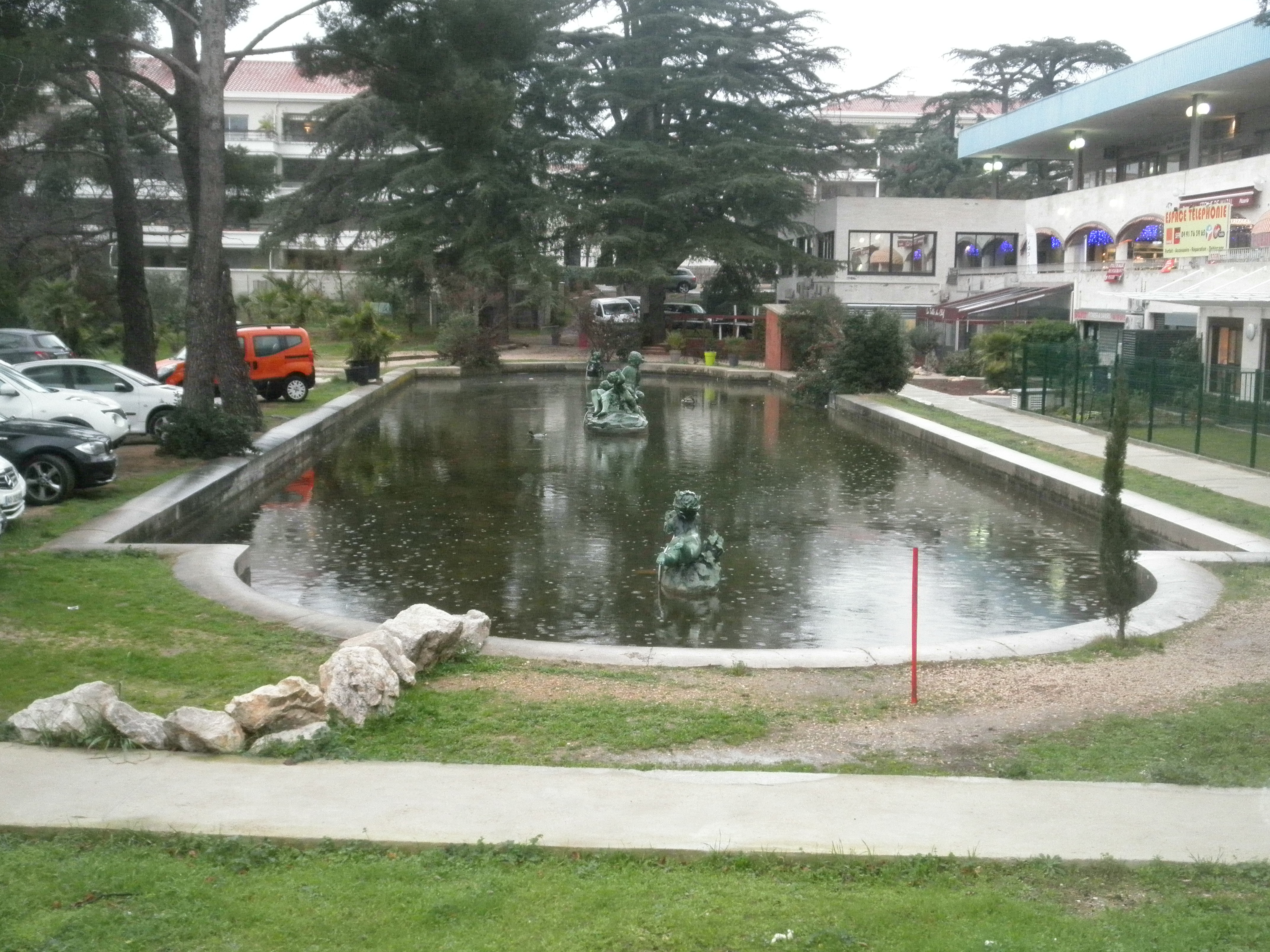 La rouvière en 2014